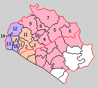 兵庫県印南郡の町村制時点の町村。